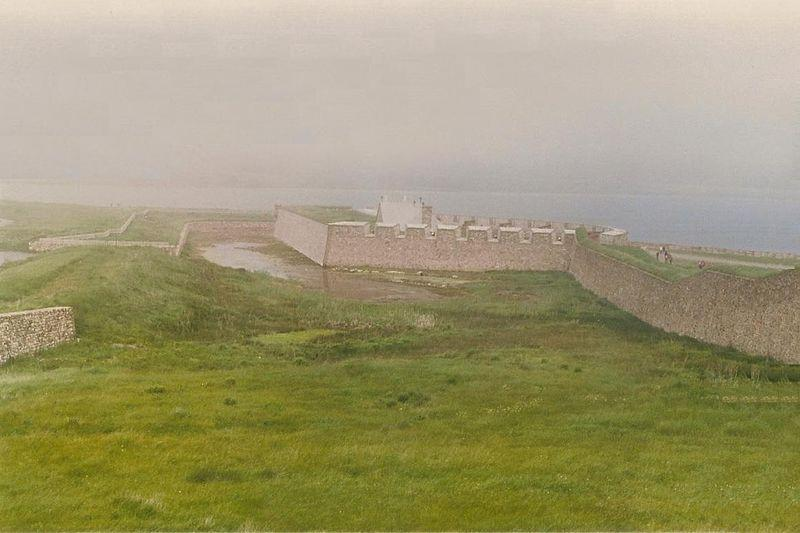 Rempart de Louisbourg